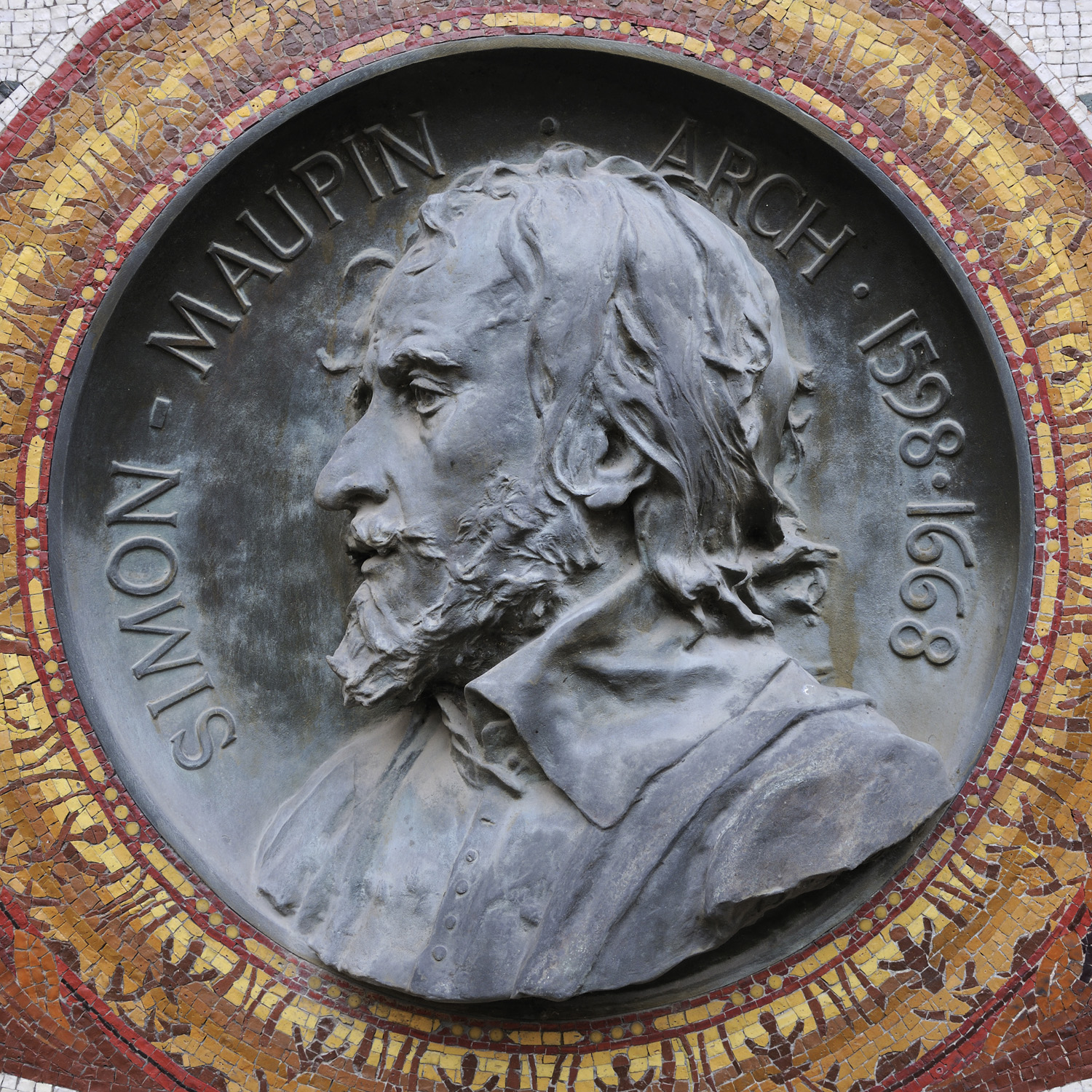 Médaillon de bronze à l'effigie de Simon Maupin, Pierre Aubert